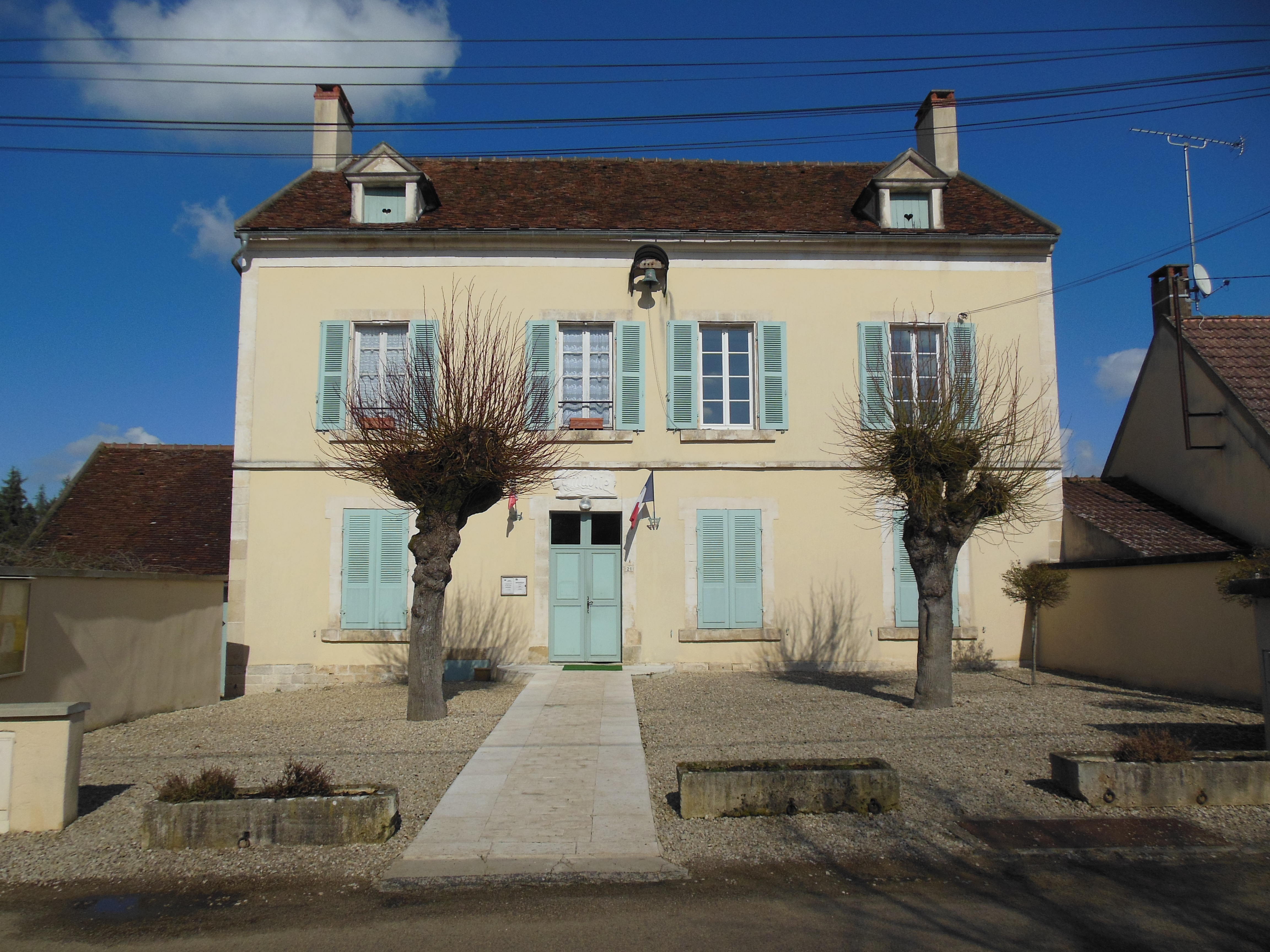 Mairie de Merry-sur-Yonne (au Bourg), Yonne, Bourgogne, France.